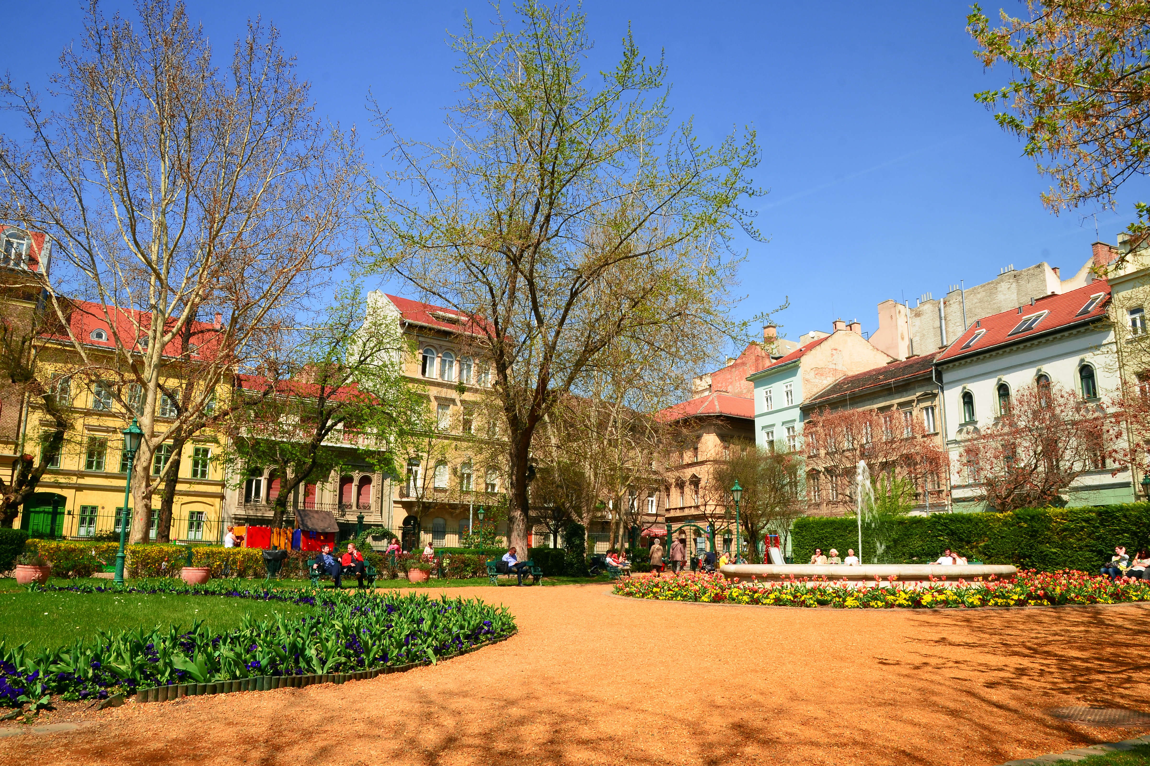 Károlyi-palota és Károlyi-kert This is a photo of a monument in Hungary. Identifier: 501